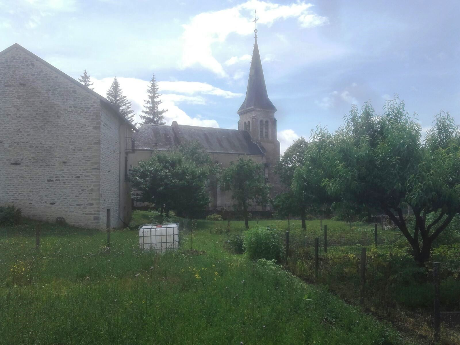 Kirko de Saint-Victor-sur-Ouche